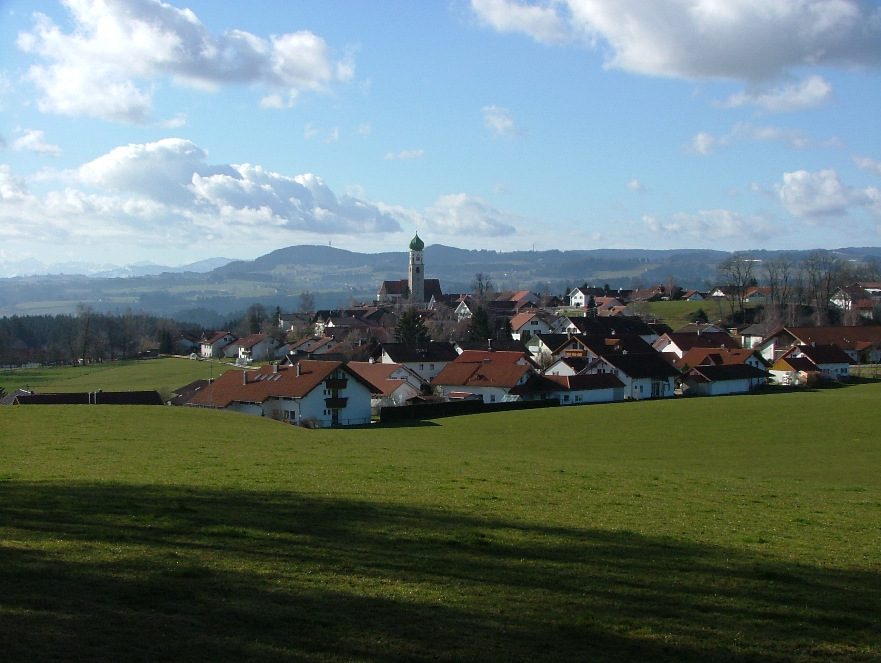 Reicholzried